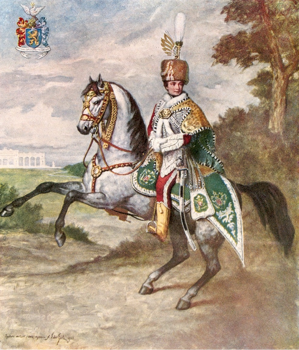 Huile sur toile de Gyula Eder (1875-1945) du capitaine János Bárczy de Bárcziház (1816-1863), membre de la Garde du corps royale. 107x92 cm.